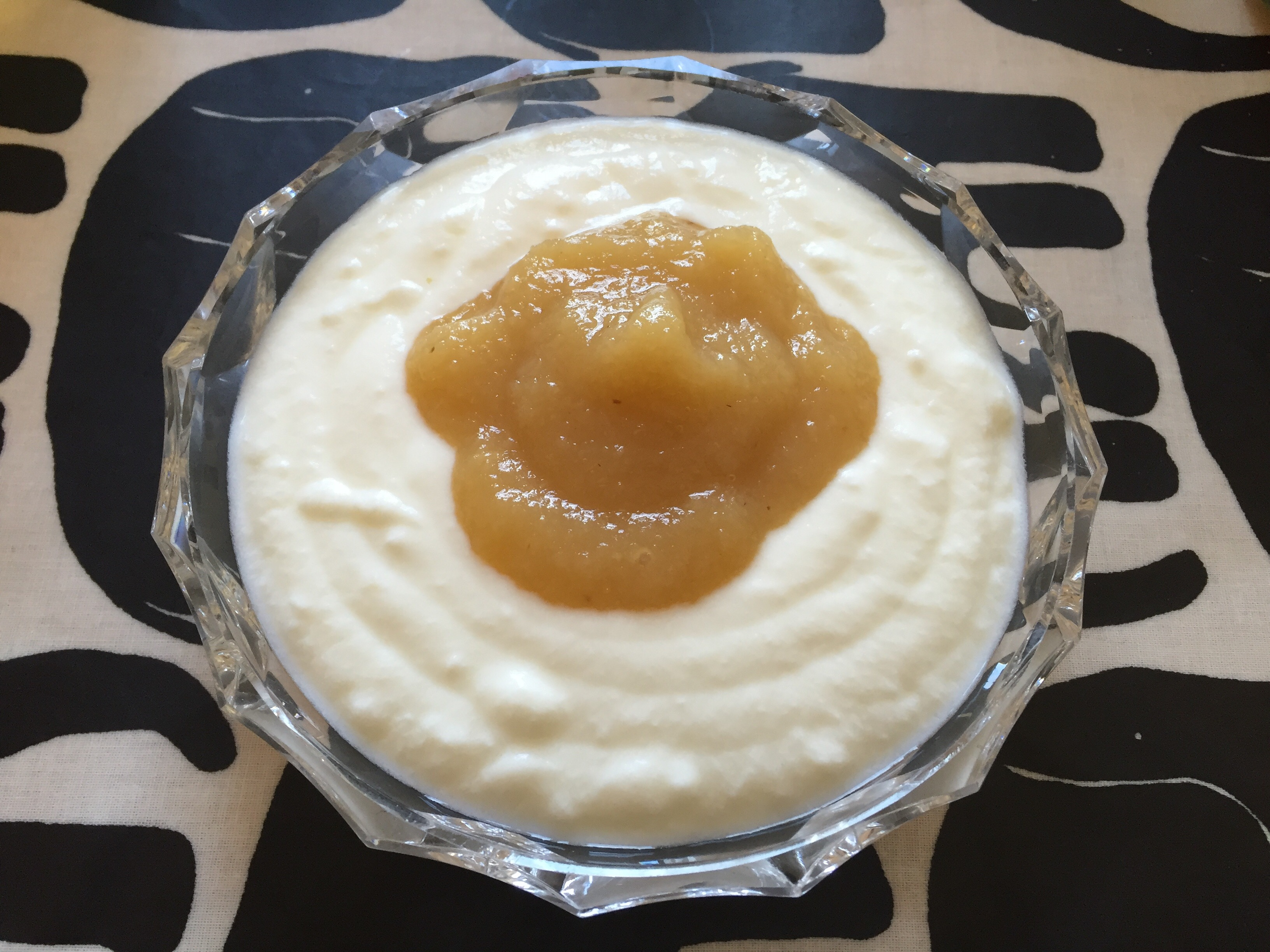 Dickmilch mit Apfelmus